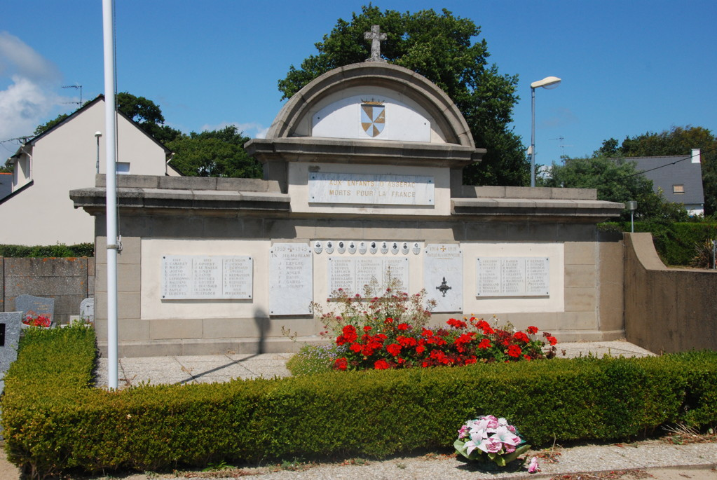 Monument aux morts 14-18 et 39-45 d'Assérac (44)